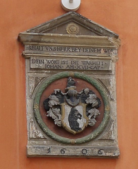 Bärenwappen am Meißner Domherrenhof